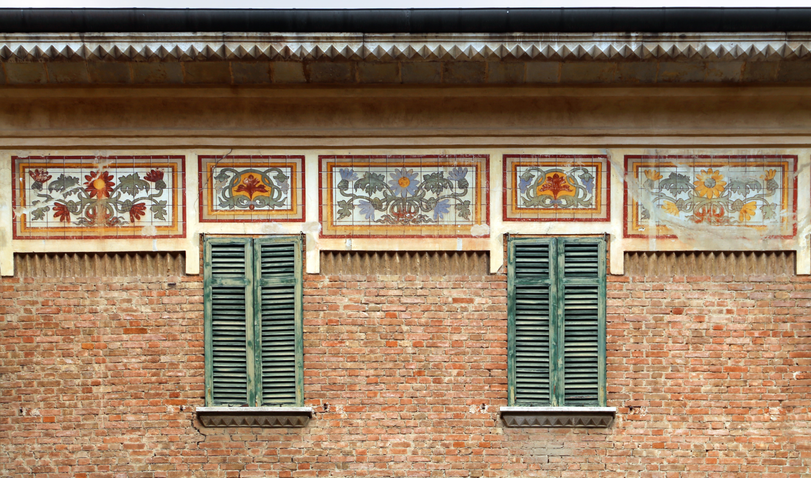 Palazzo dei Congressi (Salsomaggiore Terme) This is a photo of a monument which is part of cultural heritage of Italy.